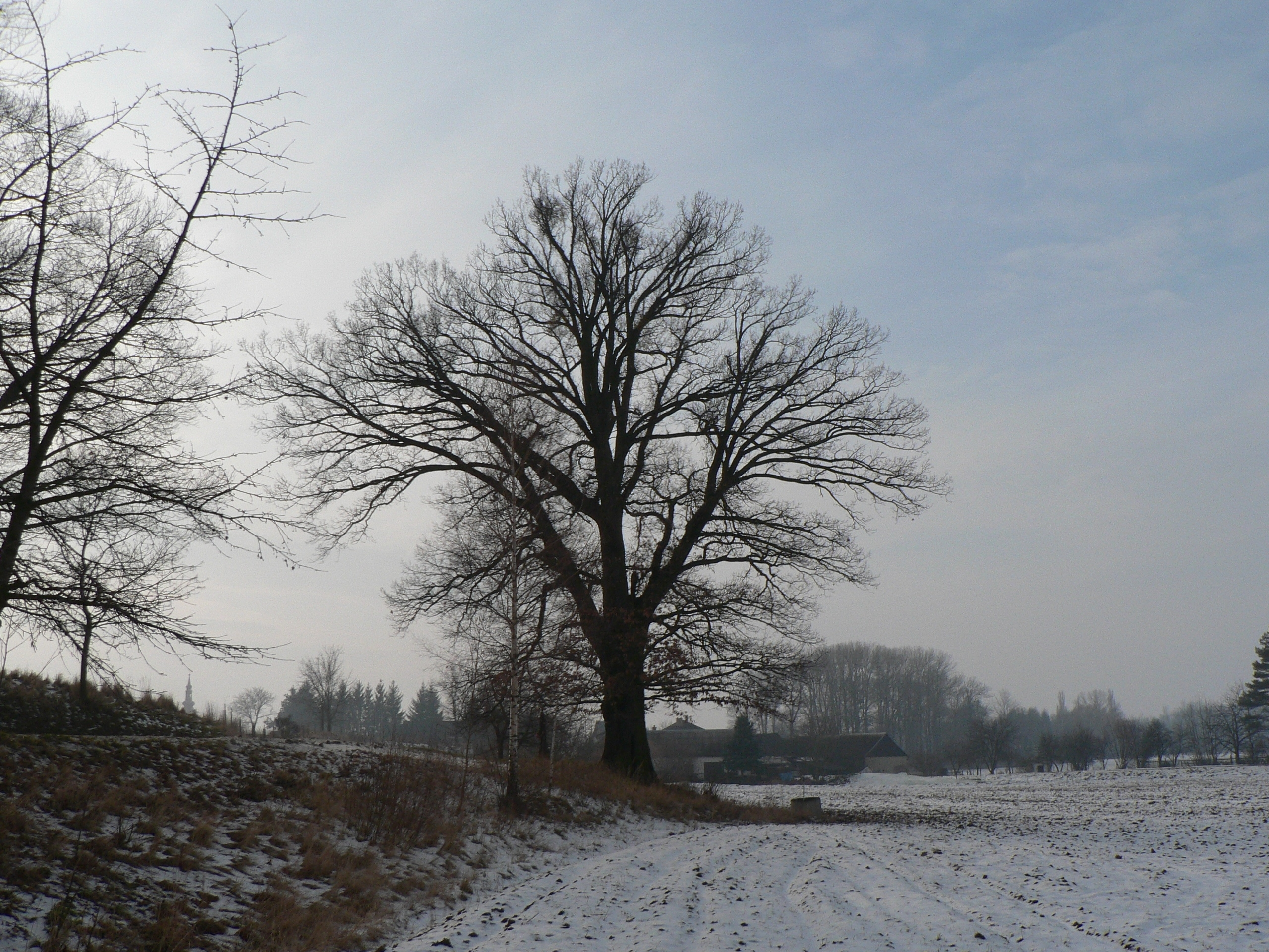 Dub u hřbitova v Třeštině.